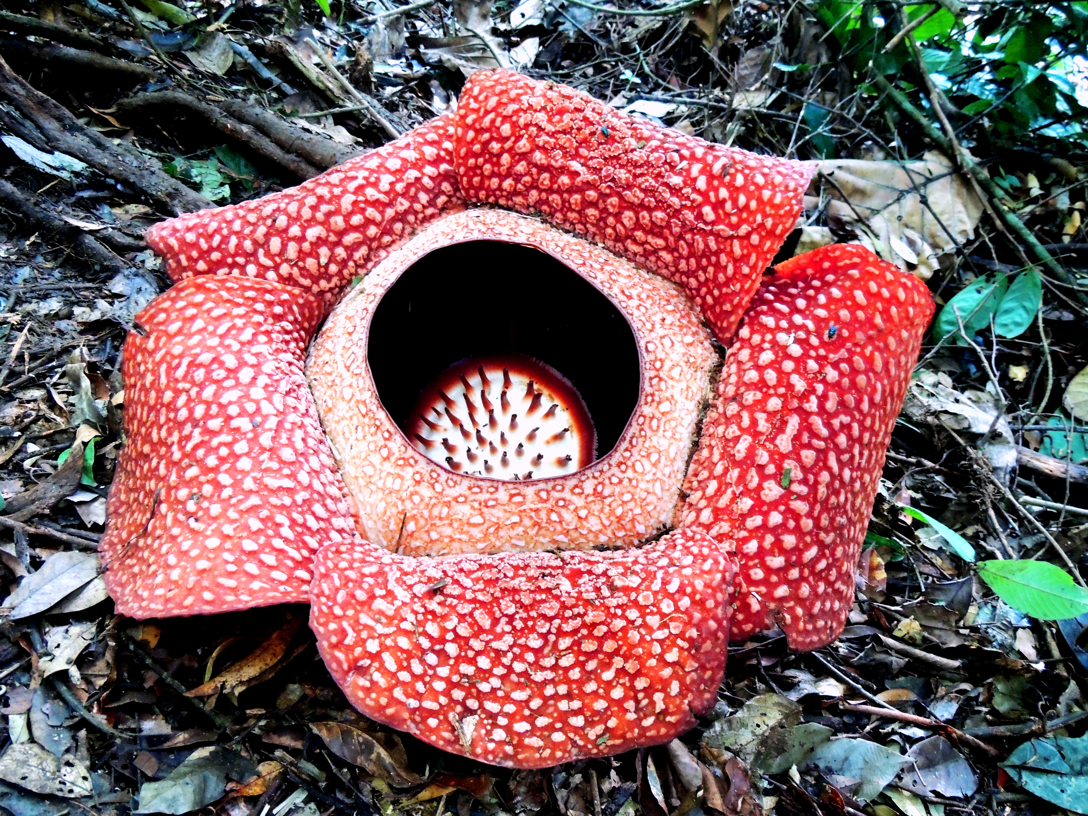 Rafflesia arnoldi Giant Flower